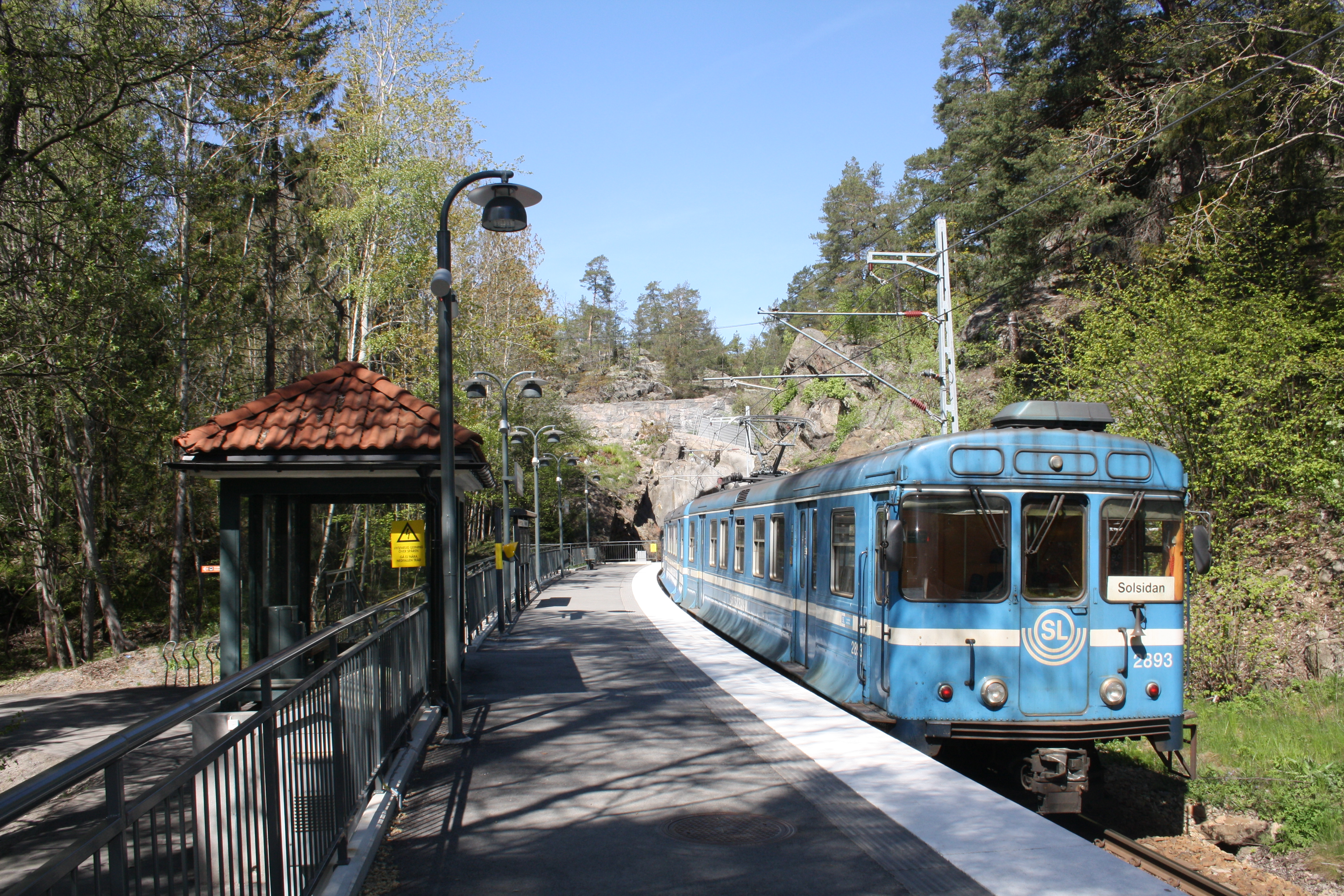 Erstaviksbadet station